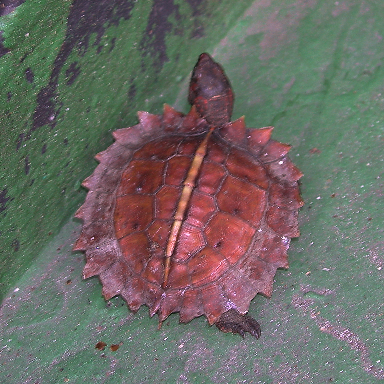 太陽龜幼體 young spinyturtle (Heosemys spinosa)